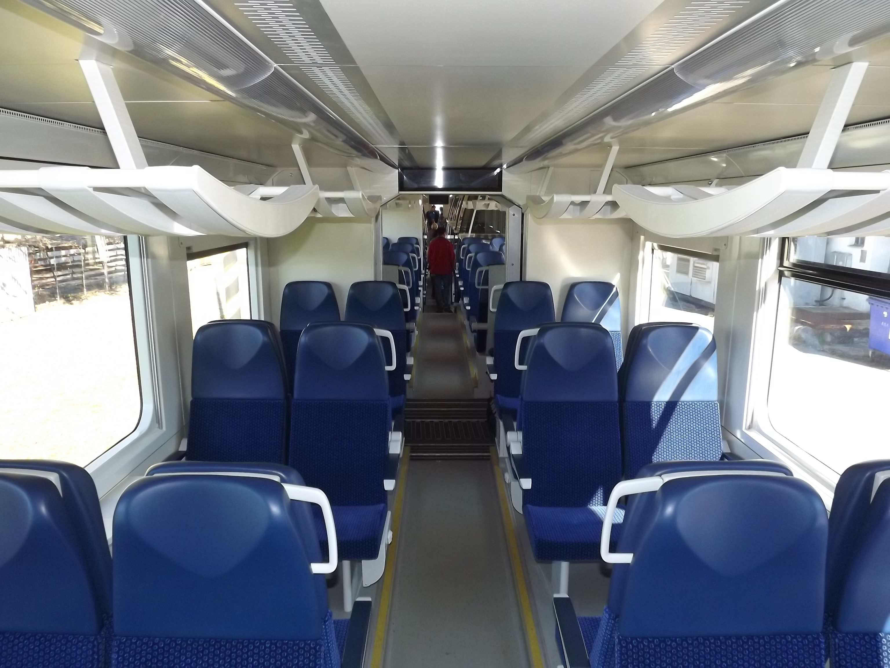 Interiér